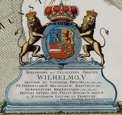 Cartouche met het wapen van Willem V van Oranje-Nassau op de 'Borgenkaart' van Theodorus Beckering